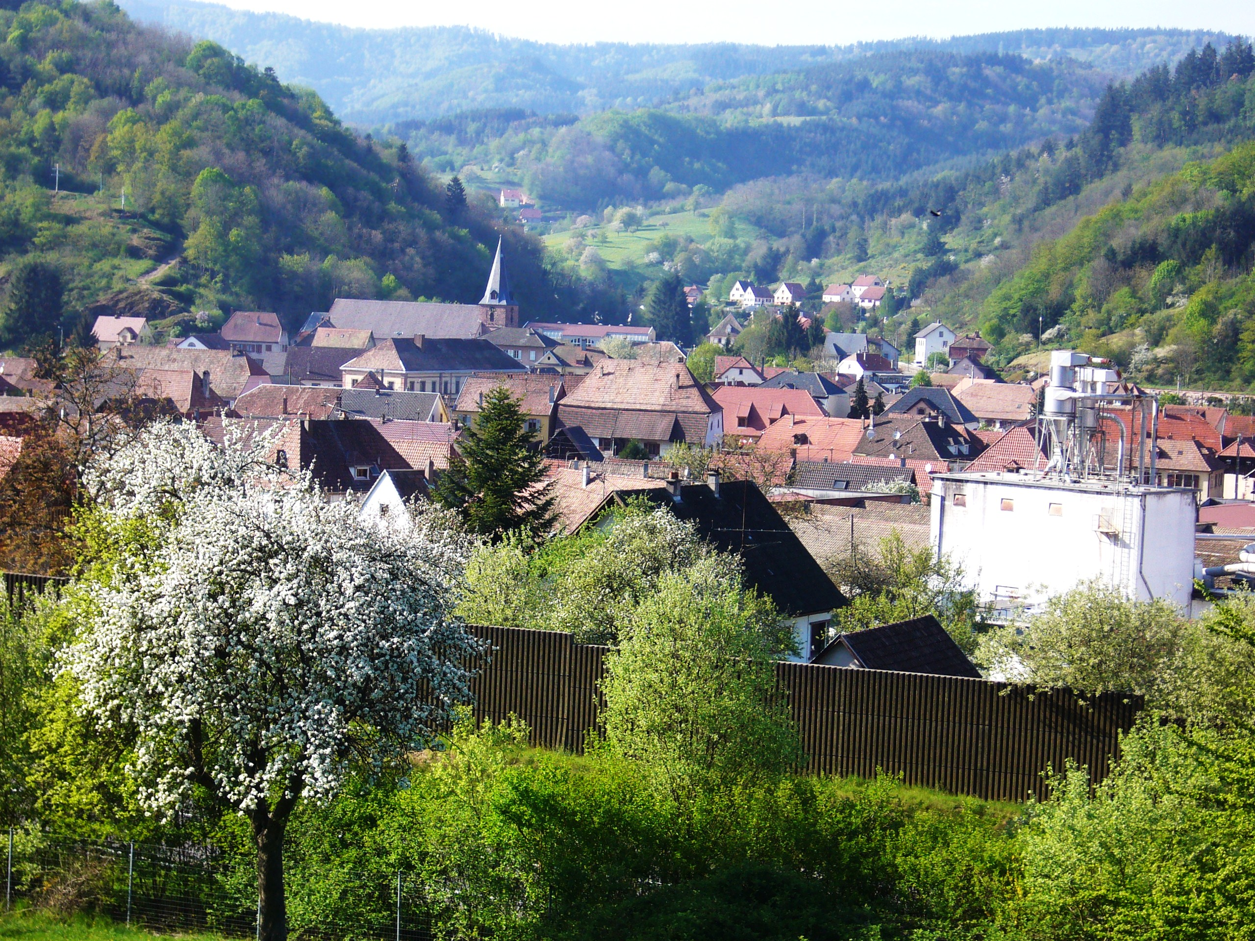 Lièpvre 398.JPG